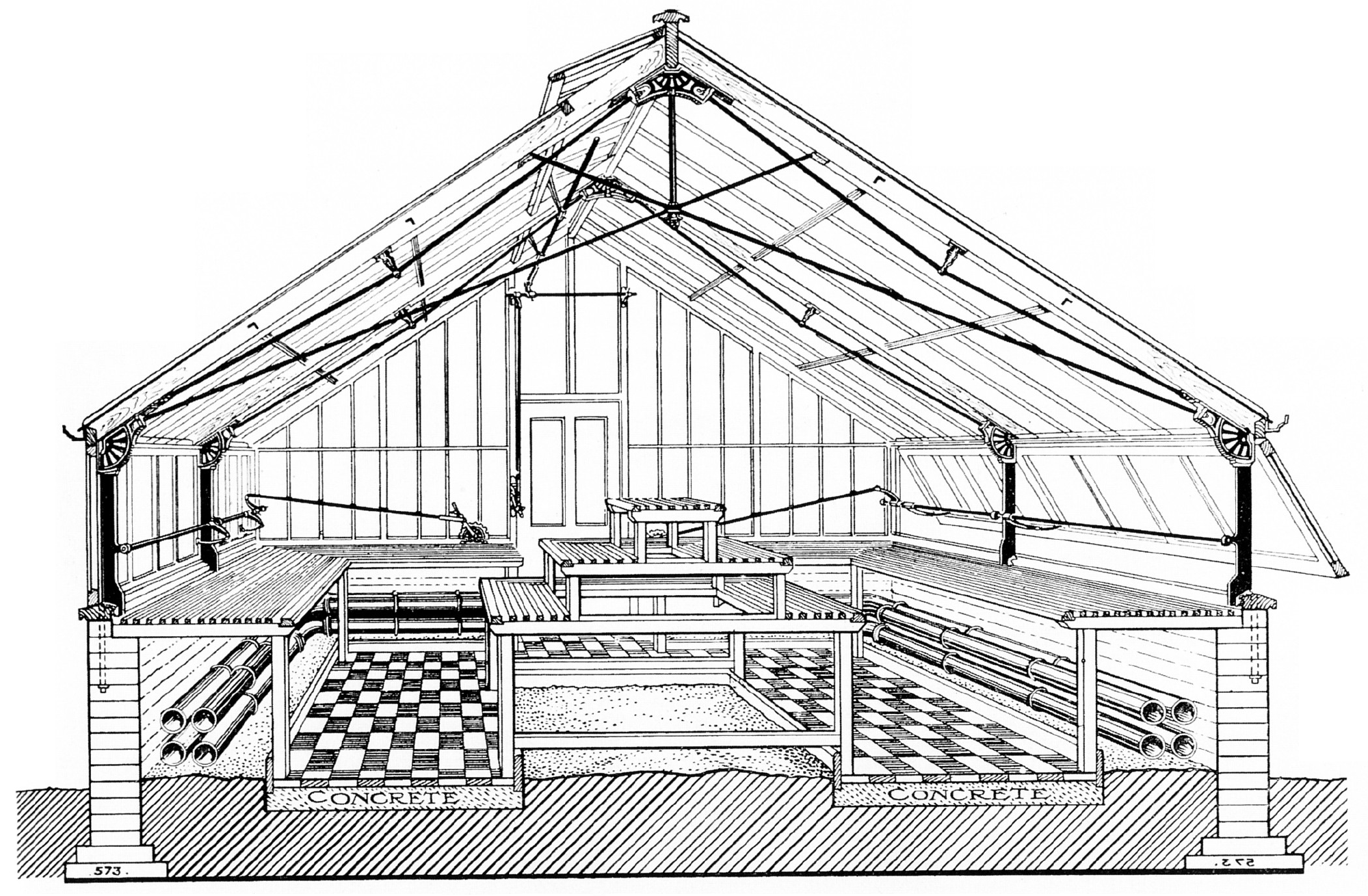 Holzschnittabbildung eines Gewächshauses aus einem Katalog von „Messenger and Company“ aus dem späten 19. Jahrhundert